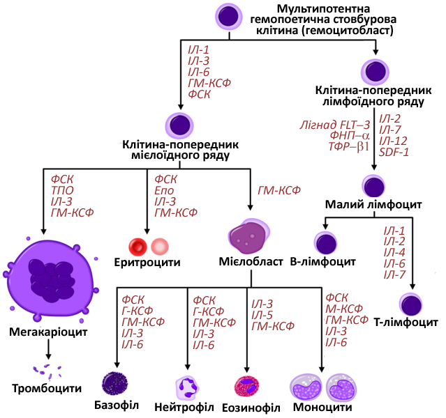 Кровотворення людини із найважливішими цитокінами, що впливають на диференціаціюФСК - Фактор стовбурових клітин (Ліганд c-Kit) ТПО - тромбопоетин Епо - Еритропоетин ІЛ - інтерлейкін М-КСФ - Колонієстимулюючий фактор макрофагів Г-КСФ - Колонієстимулюючий фактор гранулоцитів ГМ-КСФ - Колонієстимулюючий фактор гранулоцитів/макрофагів SDF-1 - Stromal cell-derived factor-1 Ліганд FLT-3 - Ліганд FMS-like tyrosine kinase 3 ФНП-α - Фактор некрозу пухлин-α ТФР-β - Трансформуючий фактор росту-β1